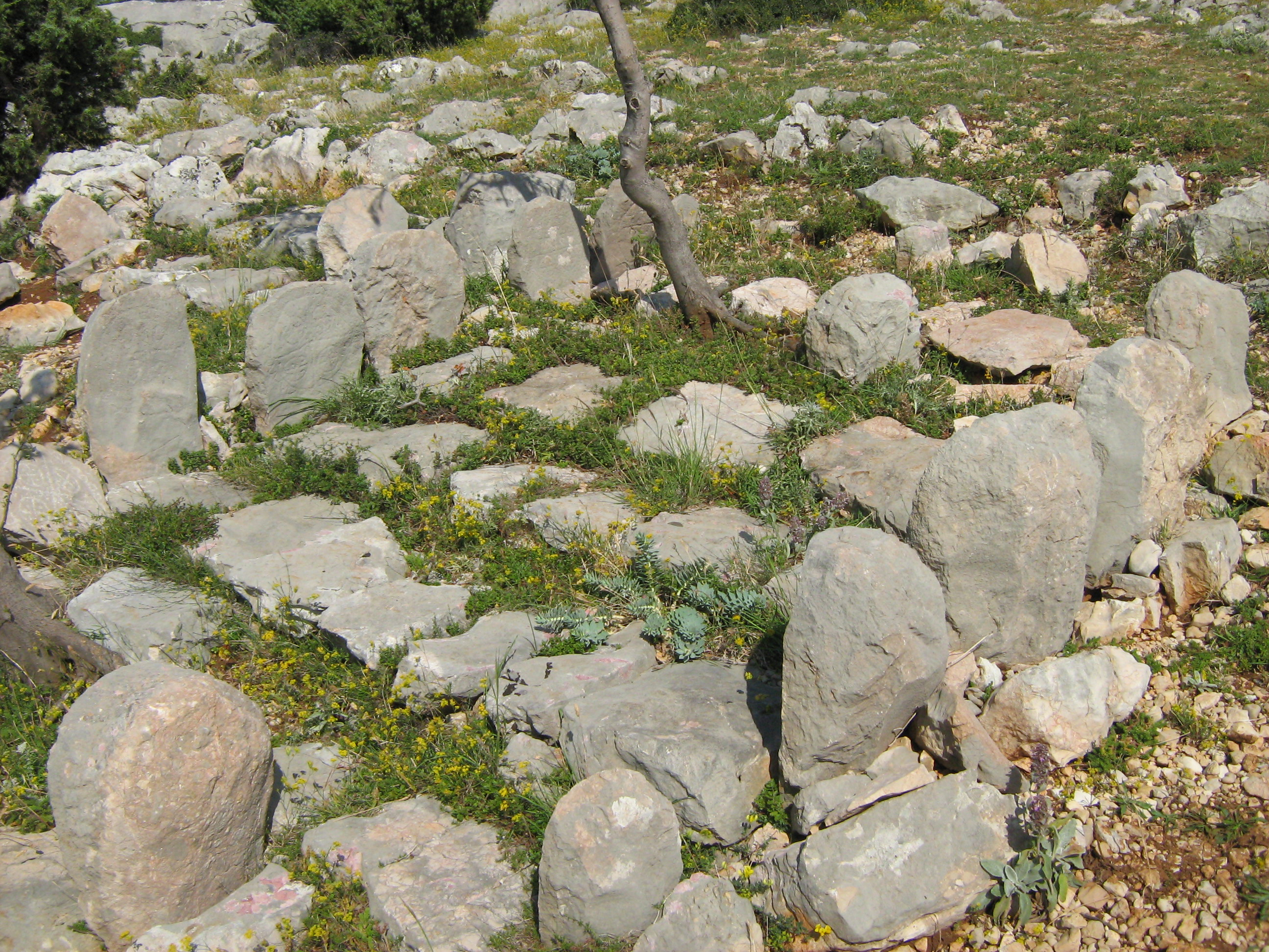 Mirila stone cemeteries in Dalmatia (Croatia), 17th to 20th century.